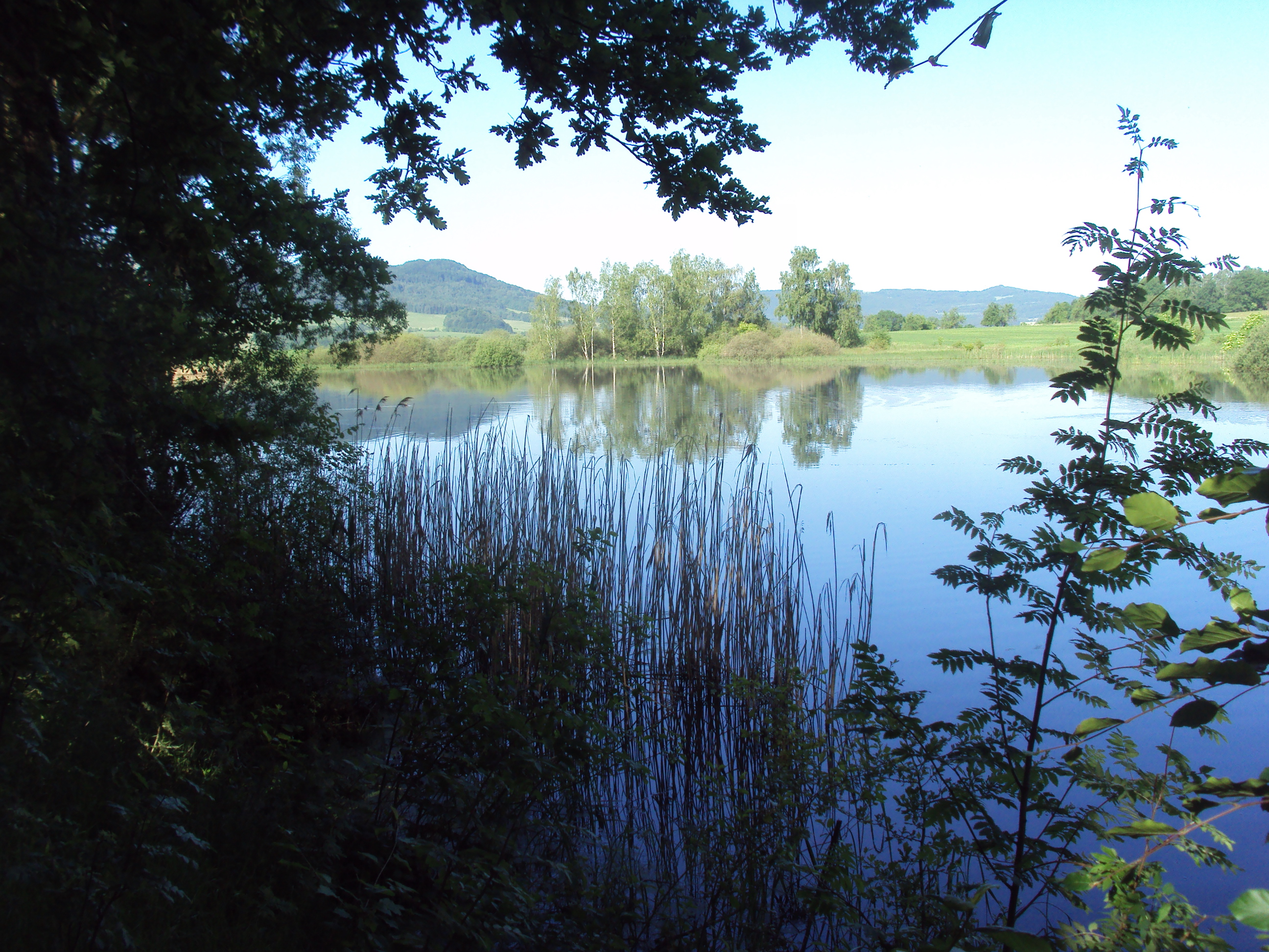 Česky: PP Stružnické rybníky